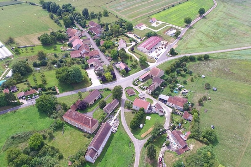 Commune de Grandecourt